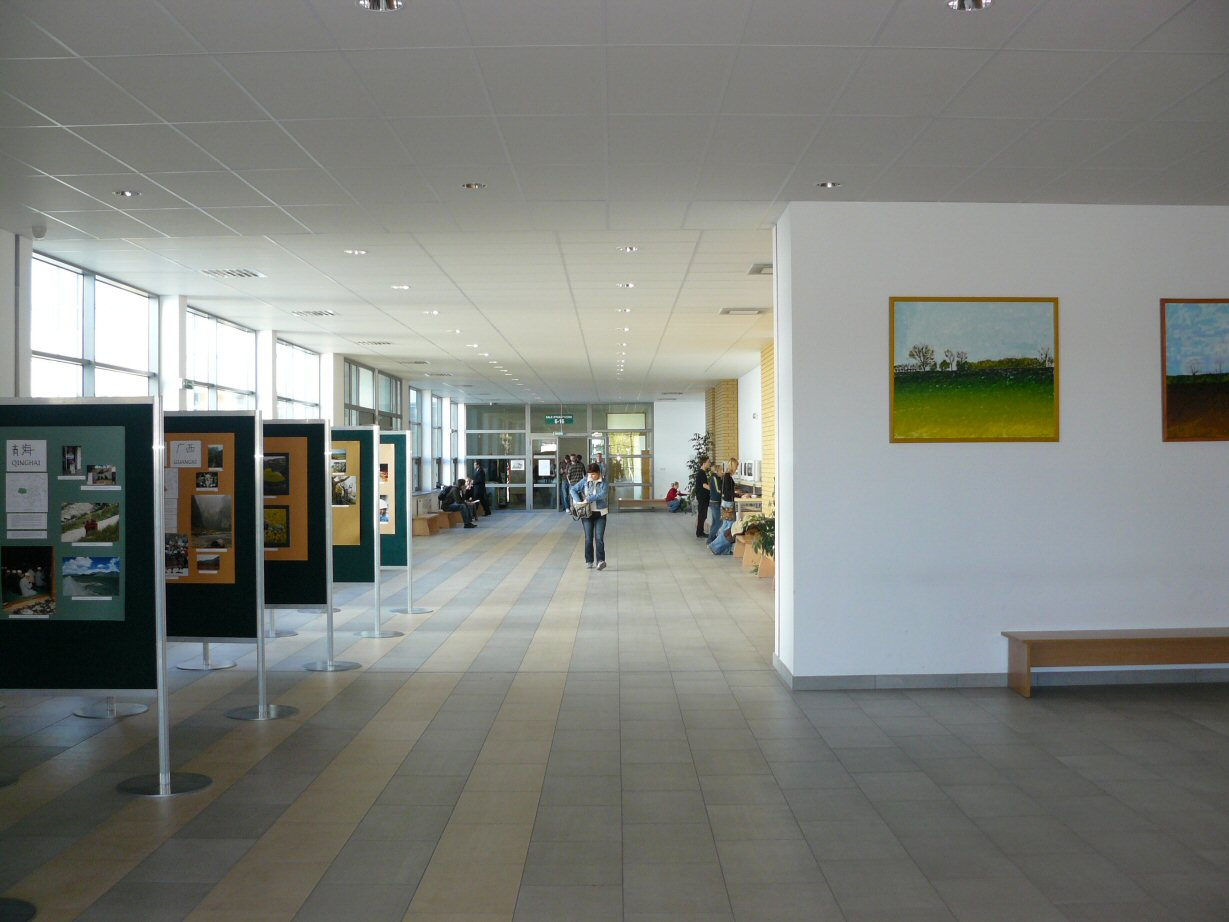 Wydział Nauk Geograficznych i Geologicznych Uniwersytetu im. Adama Mickiewicza